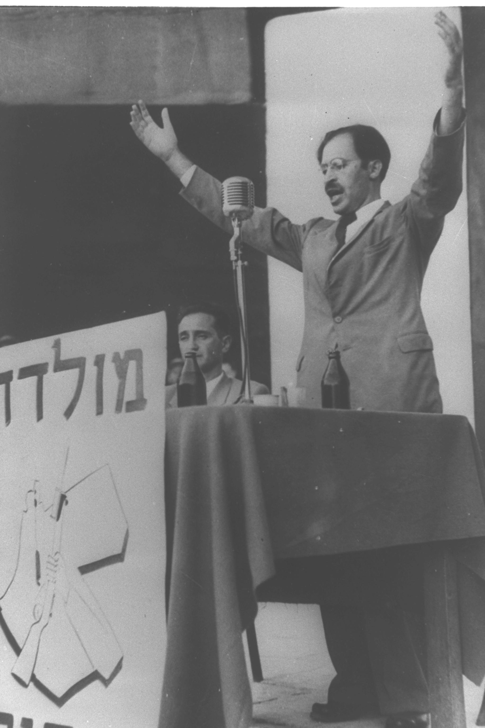 MENAHEM BEGIN DURING ONE OF HIS PUBLIC SPEECHES IN TEL AVIV.